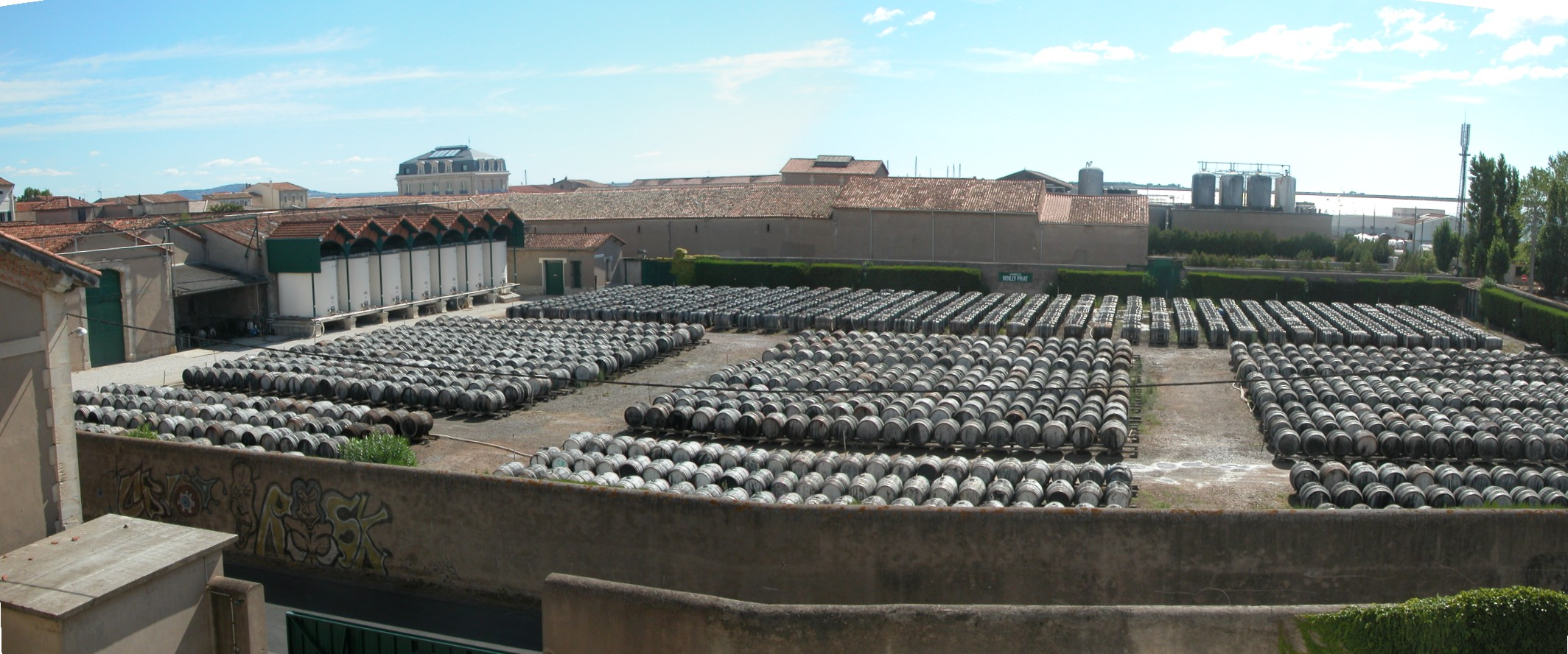 Chais Noilly-Prat à Marseillan - Vue panoramique - Photo personnelle.